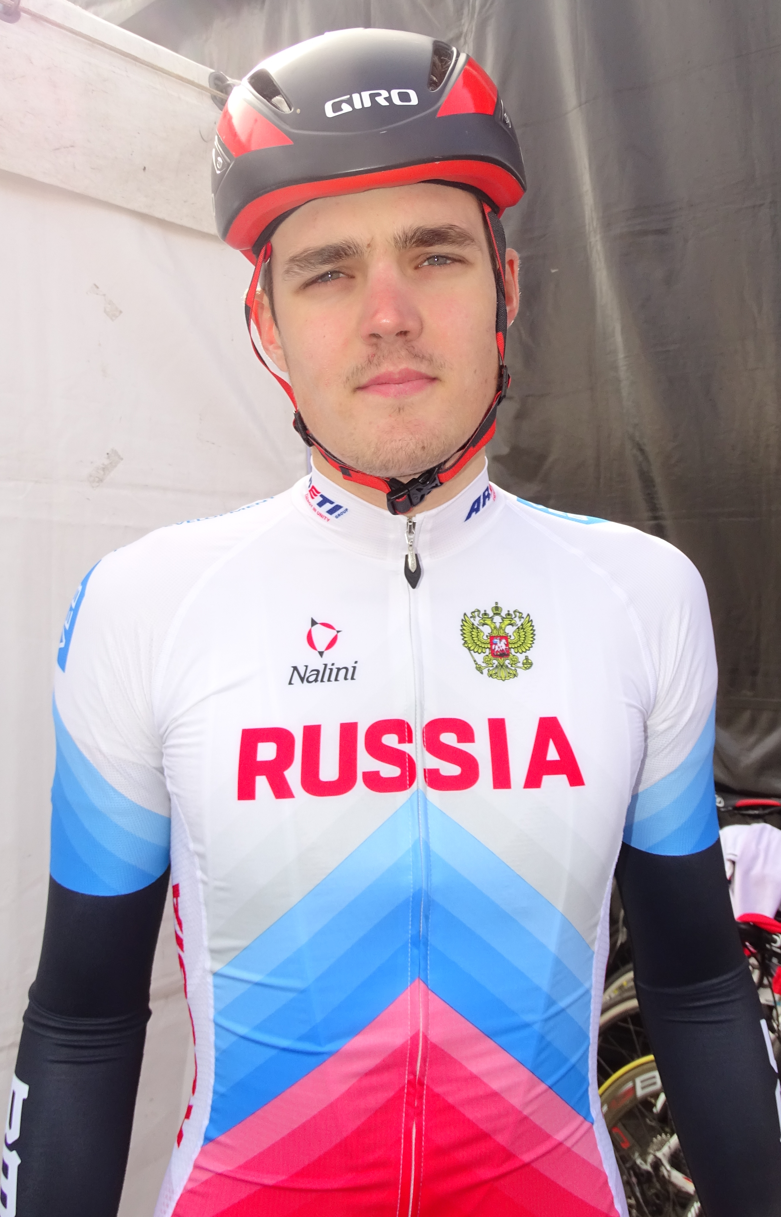 Reportage réalisé le samedi 9 avril à l'occasion du départ et de l'arrivée du Tour des Flandres espoirs 2016 à Audenarde, Belgique.